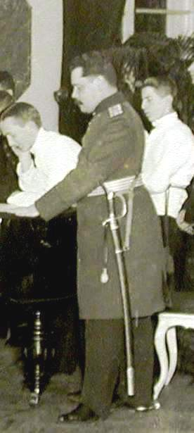 Воспитатель Пажеского корпуса полковник лейб-гвардии Александр Николаевич Фену на уроке музыки с воспитанниками корпуса.